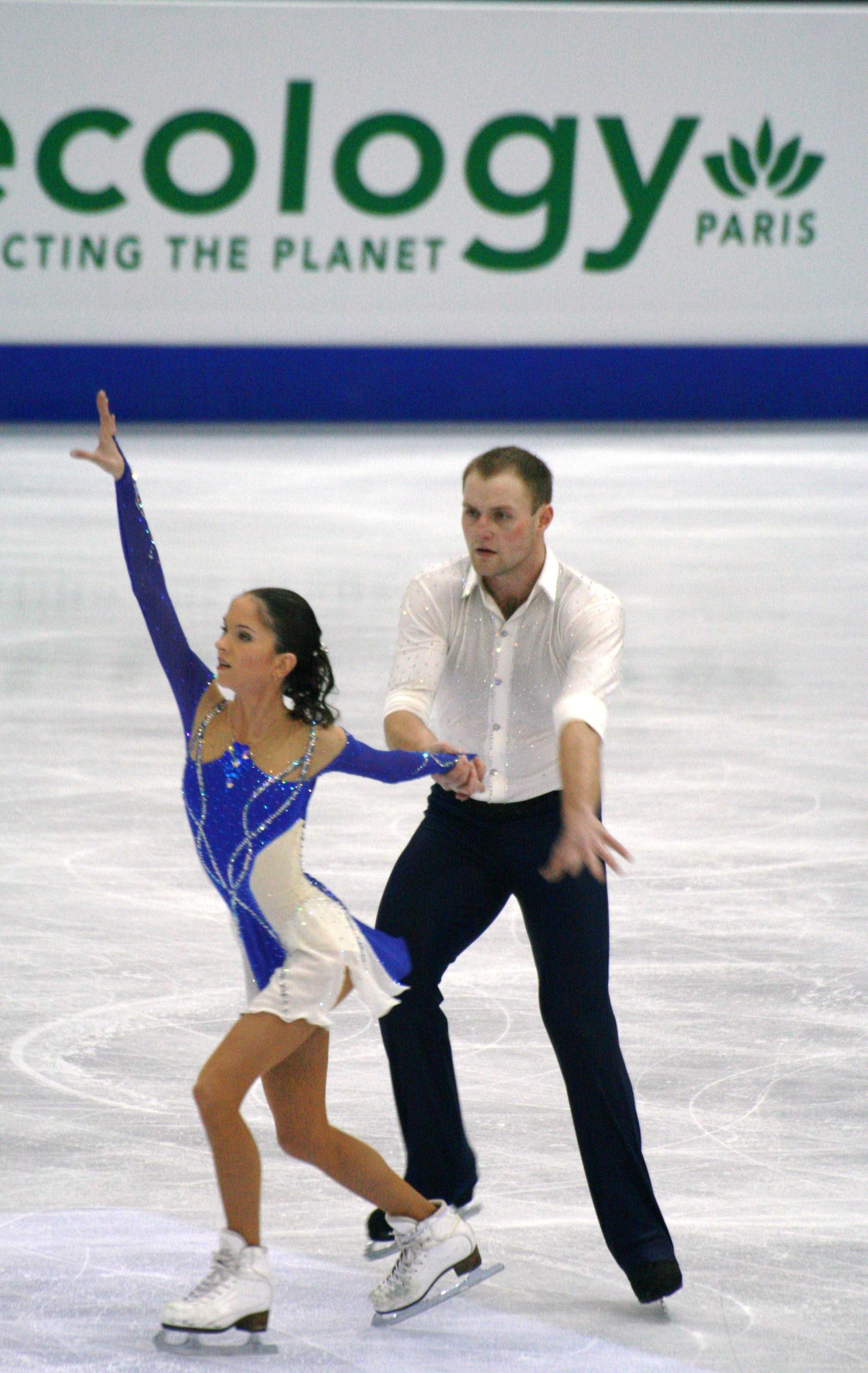 Вера Базарова и Юрий Ларионов (Россия) на чемпионате мира по фигурному катанию 2012